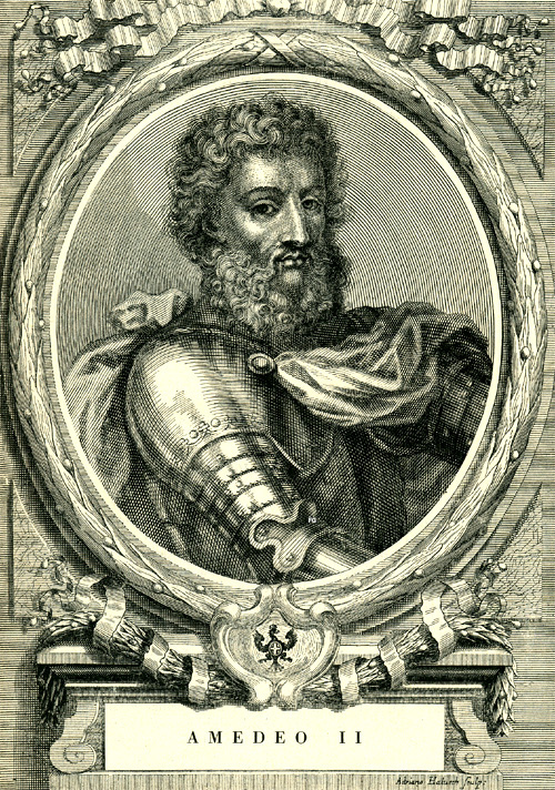 Amedeo II di Savoia (1048-1078)